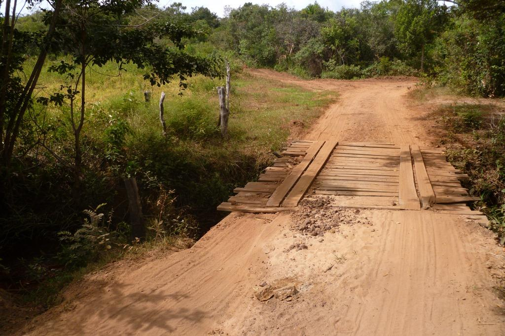 Córrego do Guará, limite entre os municípios de Montezuma e Vargem Grande do Rio Pardo, Minas Gerais, Brasil.